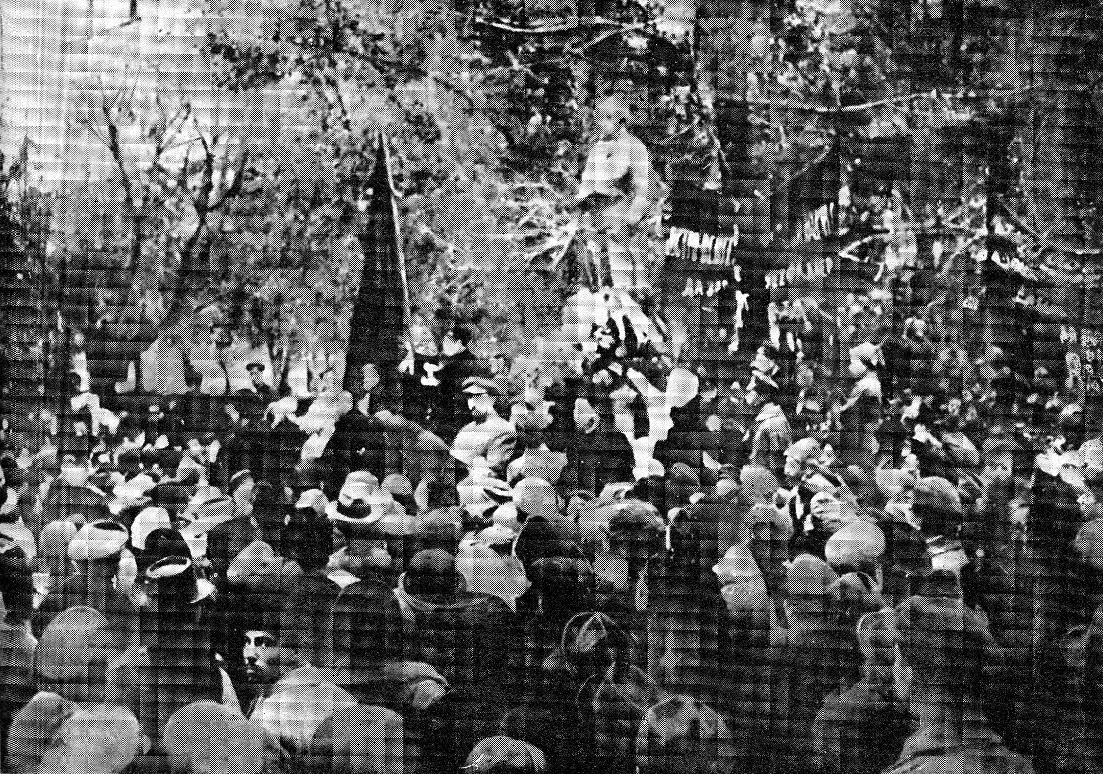 Открытие памятник Робеспьеру в 1918 году